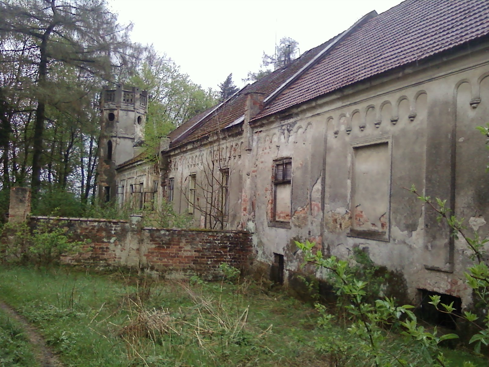 zámek